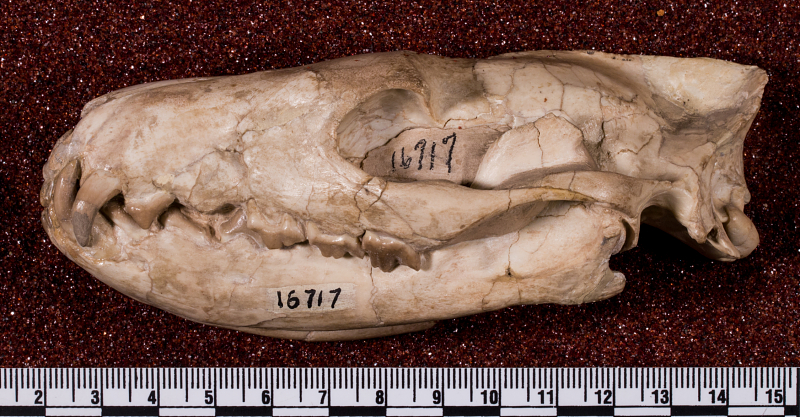 Hyaenodon (Protohyaenodon) crucians Leidy, 1853